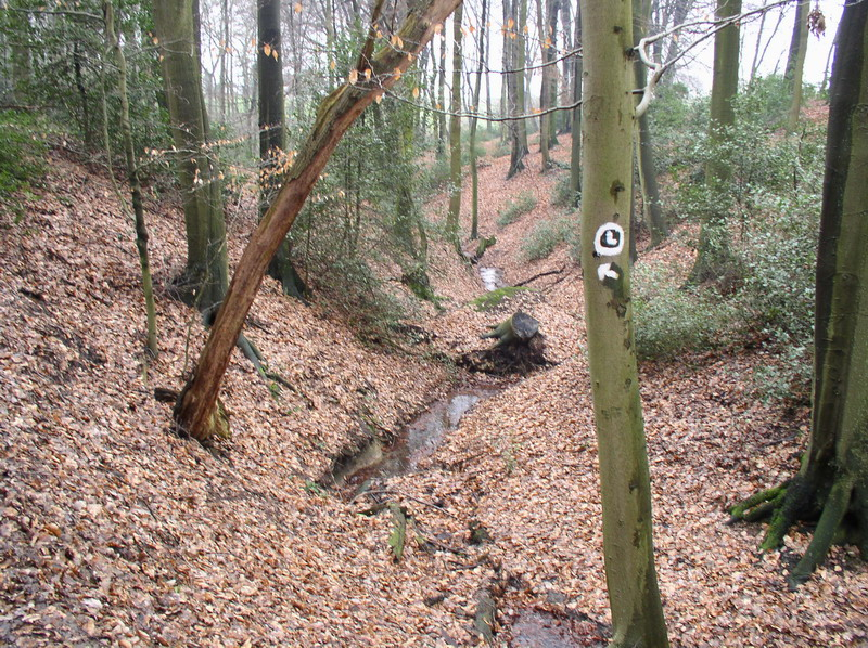 Ein Siefen am Leichlinger Rundweg zwischen St. Heribert und Bremersheide in Leichlingen